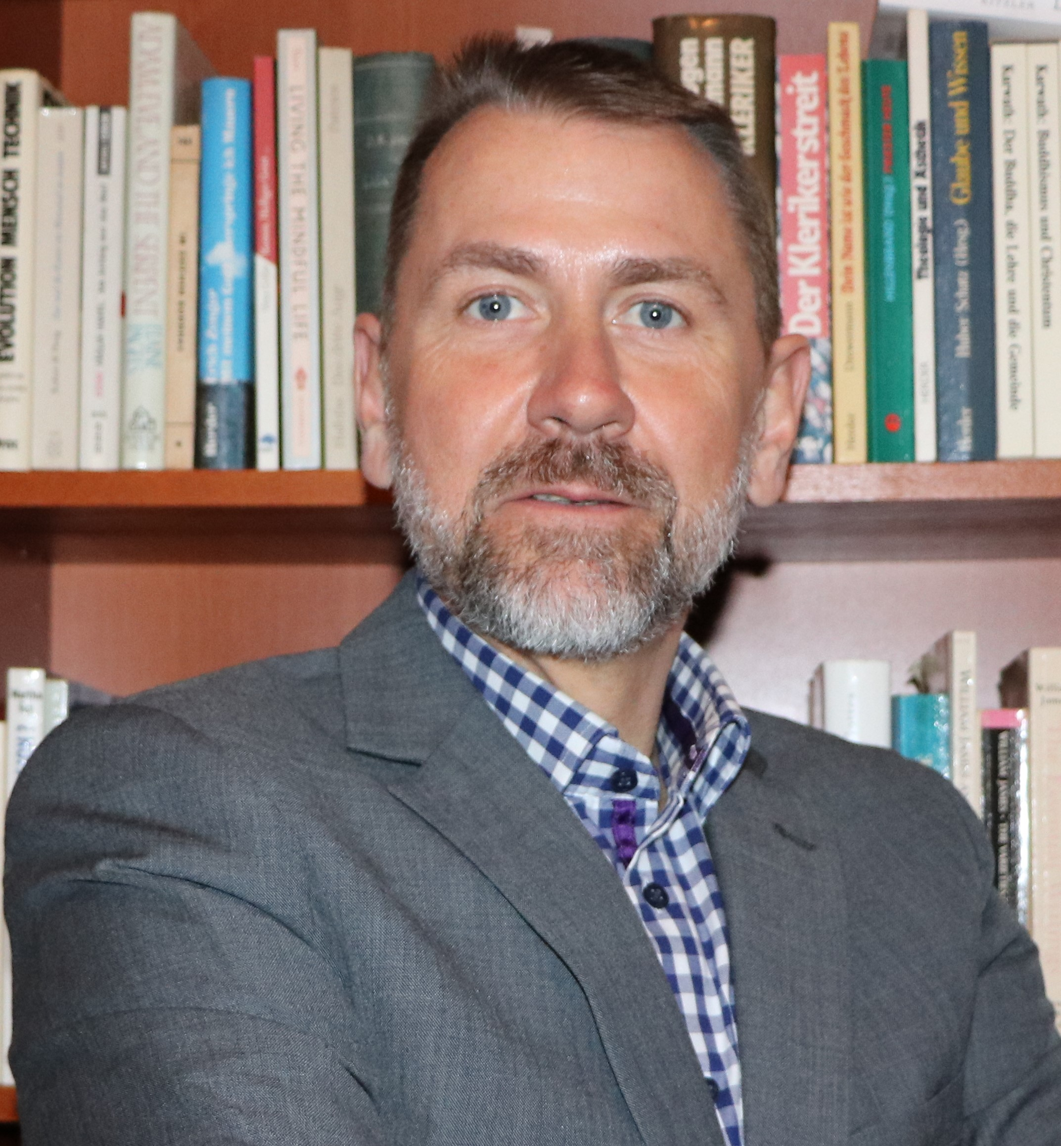 Selbstportrait mit Stativ